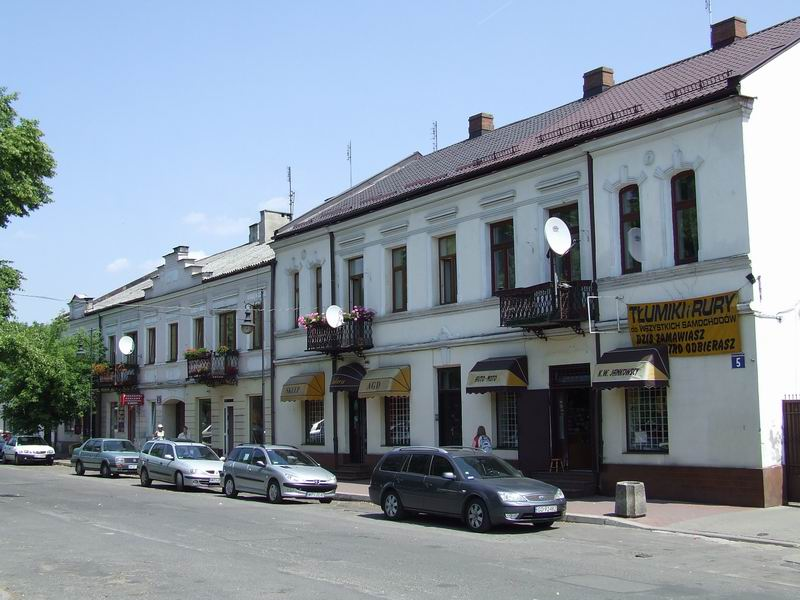 Góra Kalwaria, main square